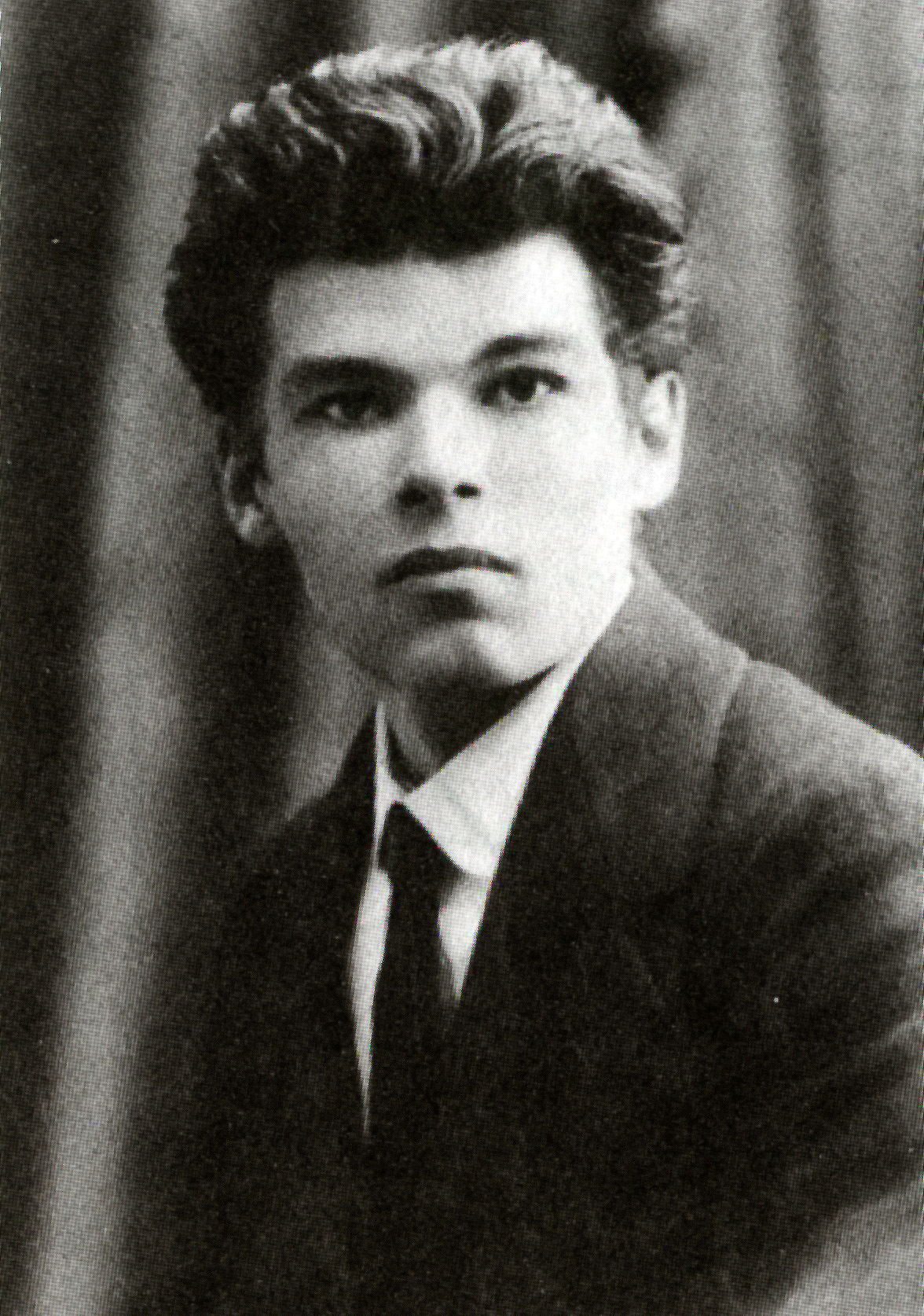 Семенко Михайль Васильович на поштовій картці.